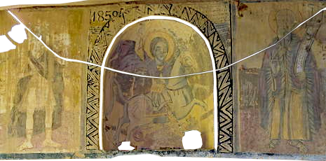 Стенопис от църквата „Свети Георги“ в македонското село Боище